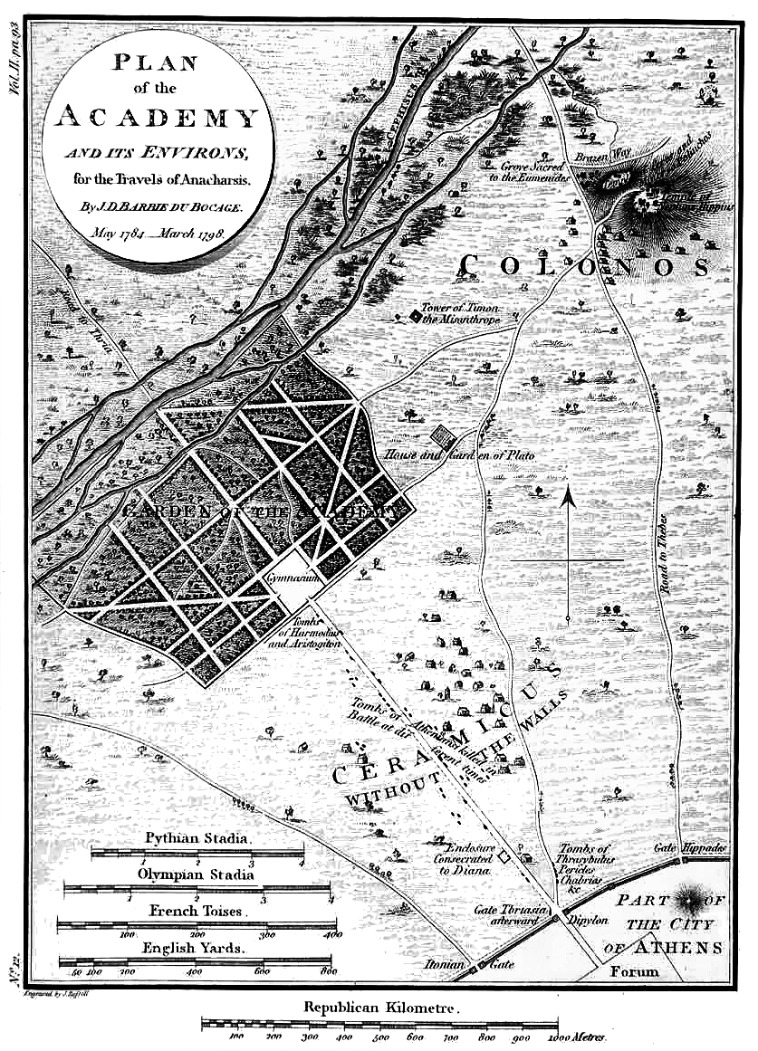 План античной Академии около Афин. Барбье дю Бокаж, Жан-Дени (Jean-Denis Barbié du Bocage)